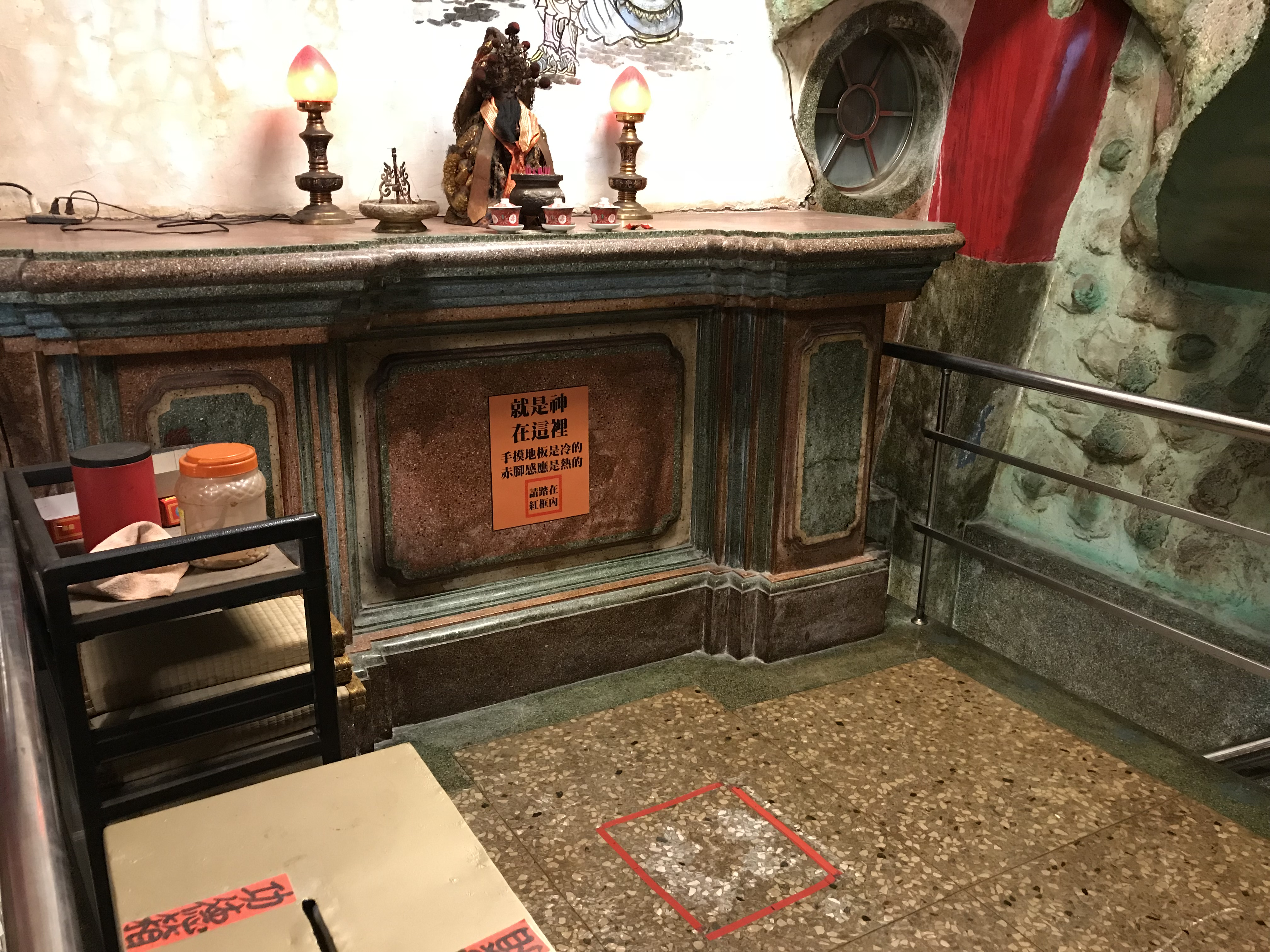 中文（台灣）: 員林衡文宮玄天上帝巨型神像內部四樓溫熱處